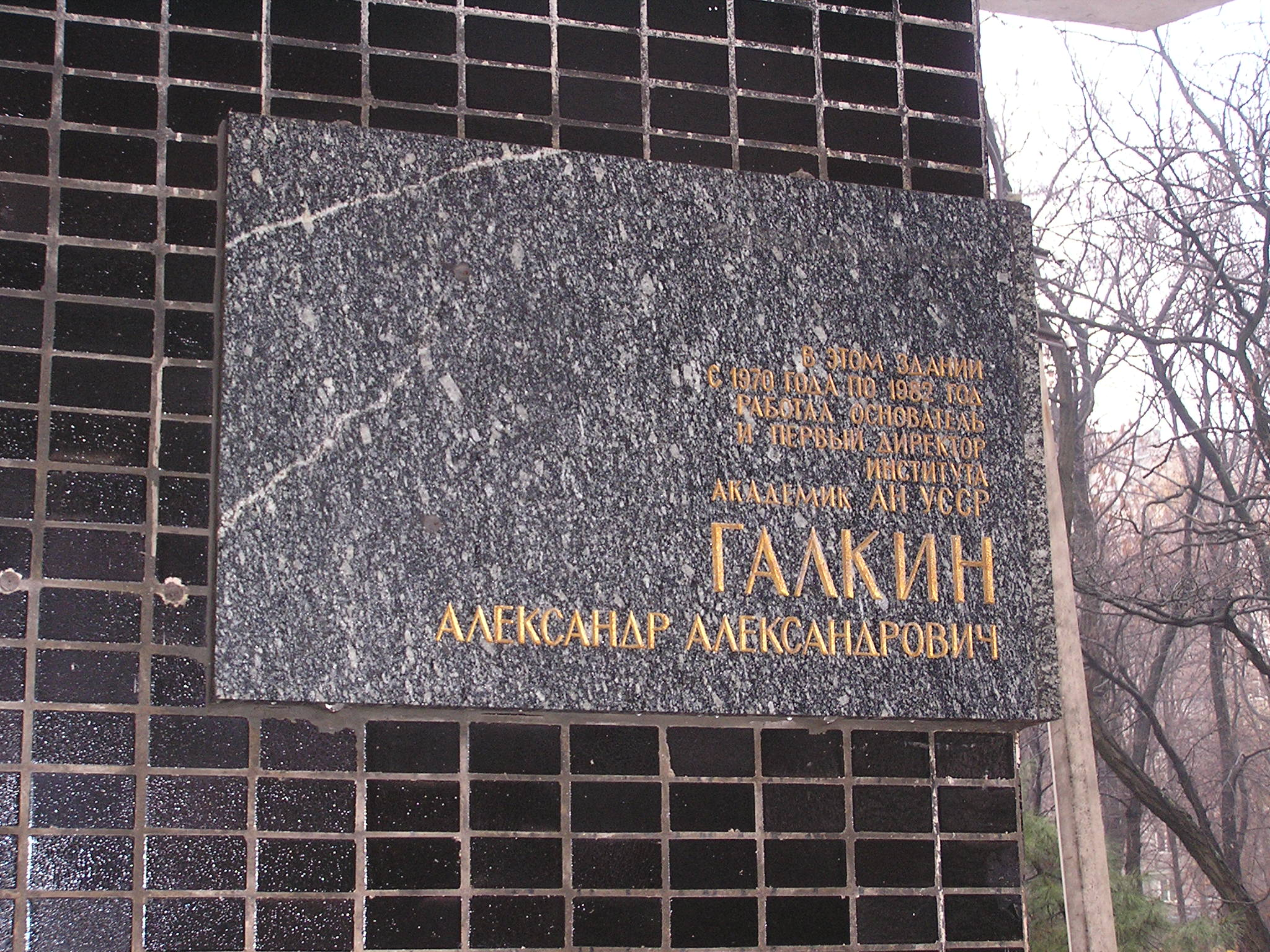 Донецк. Мемориальная доска Галкина